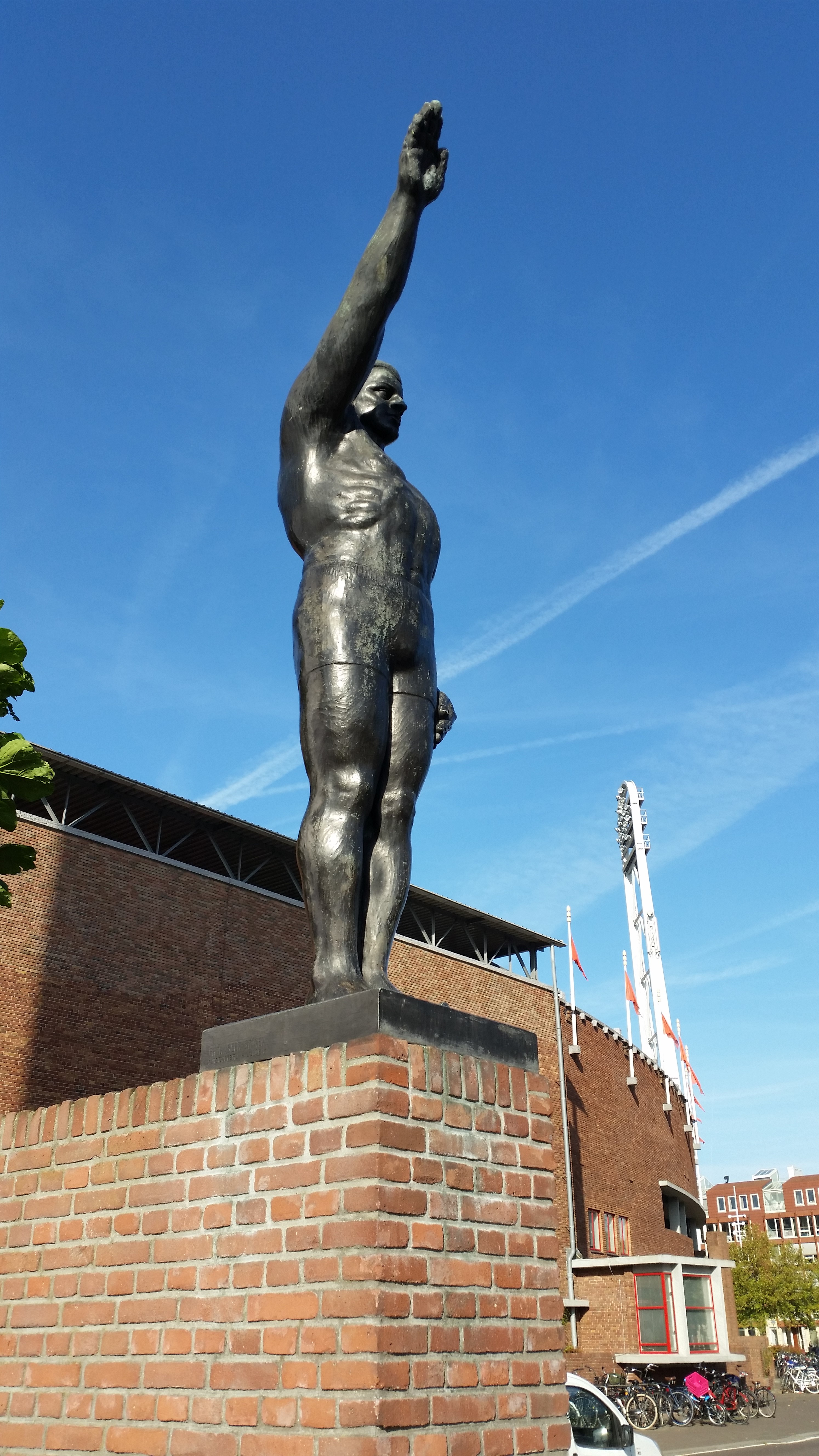 Van Tuyll-monument ofwel De Olympische groet, Stadionplein